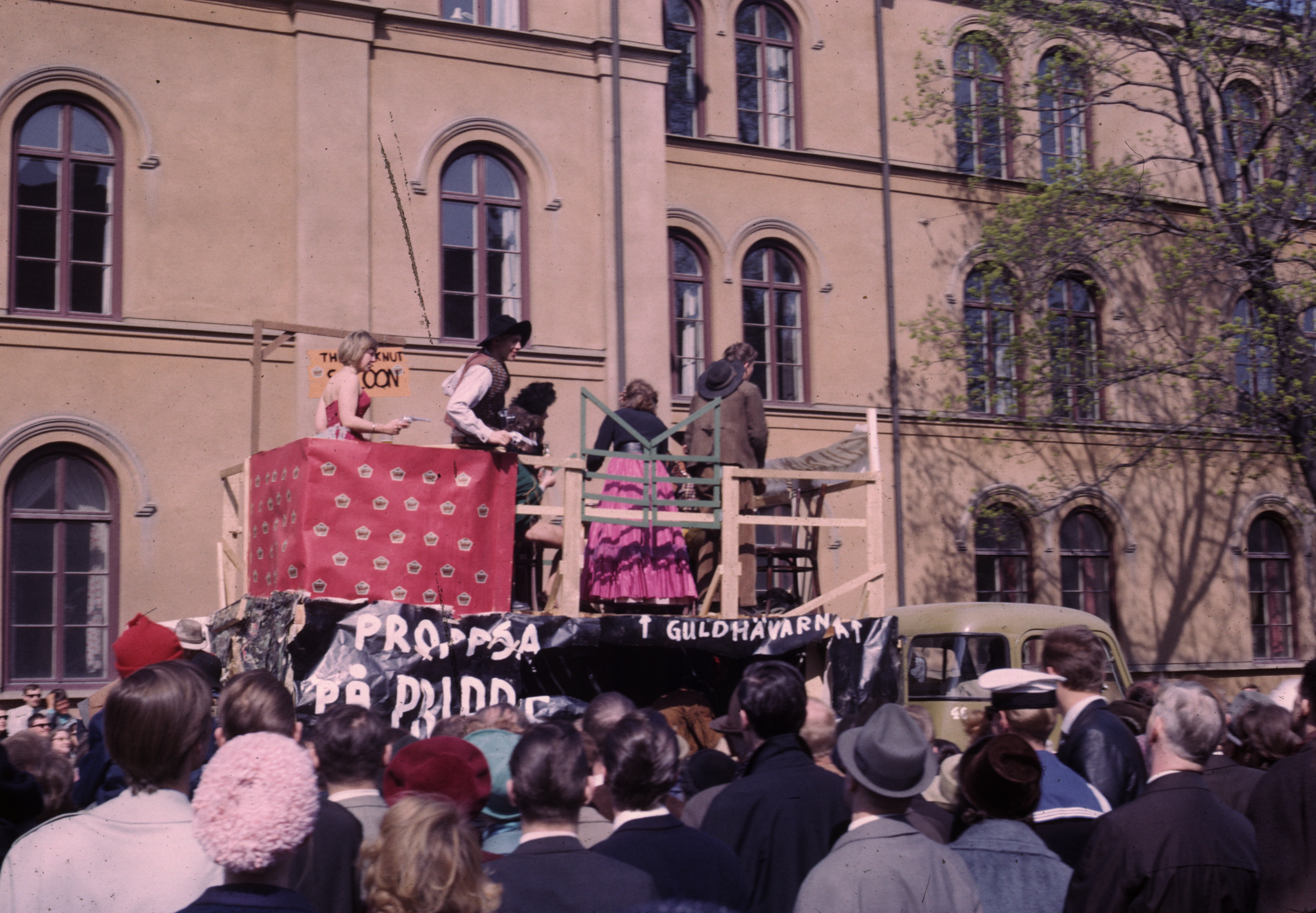 Quarnevalen (Students' parade in Stockholm)